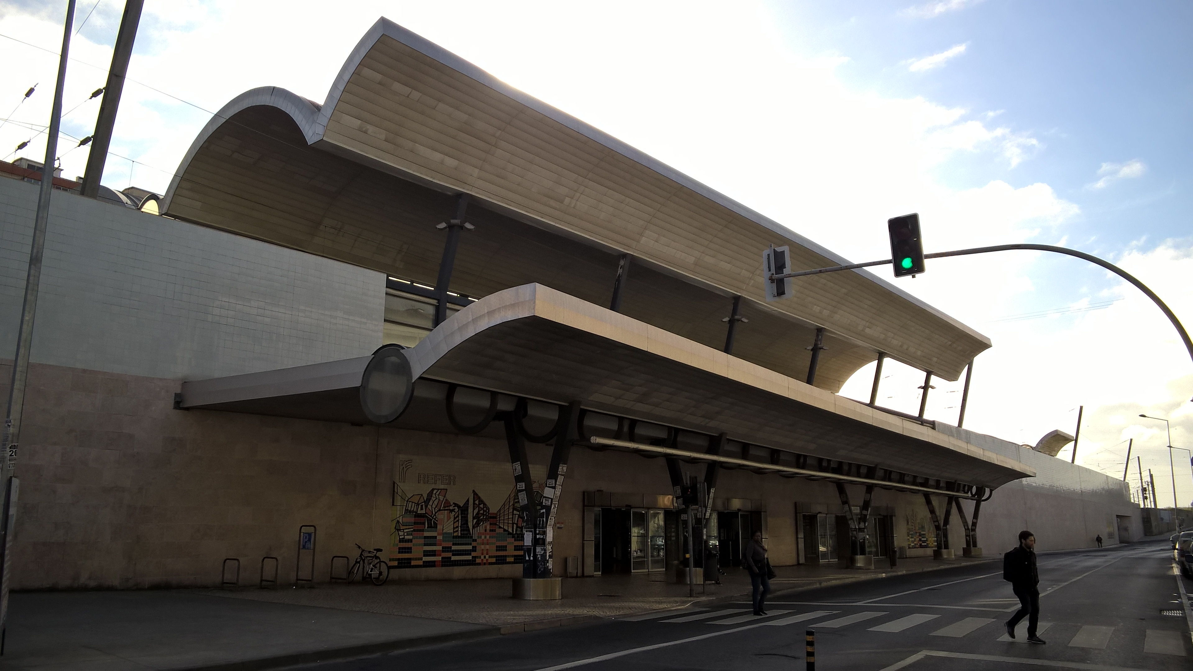 Agualva-Cacém train station - lado sul